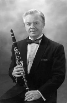 Владимир Соколов